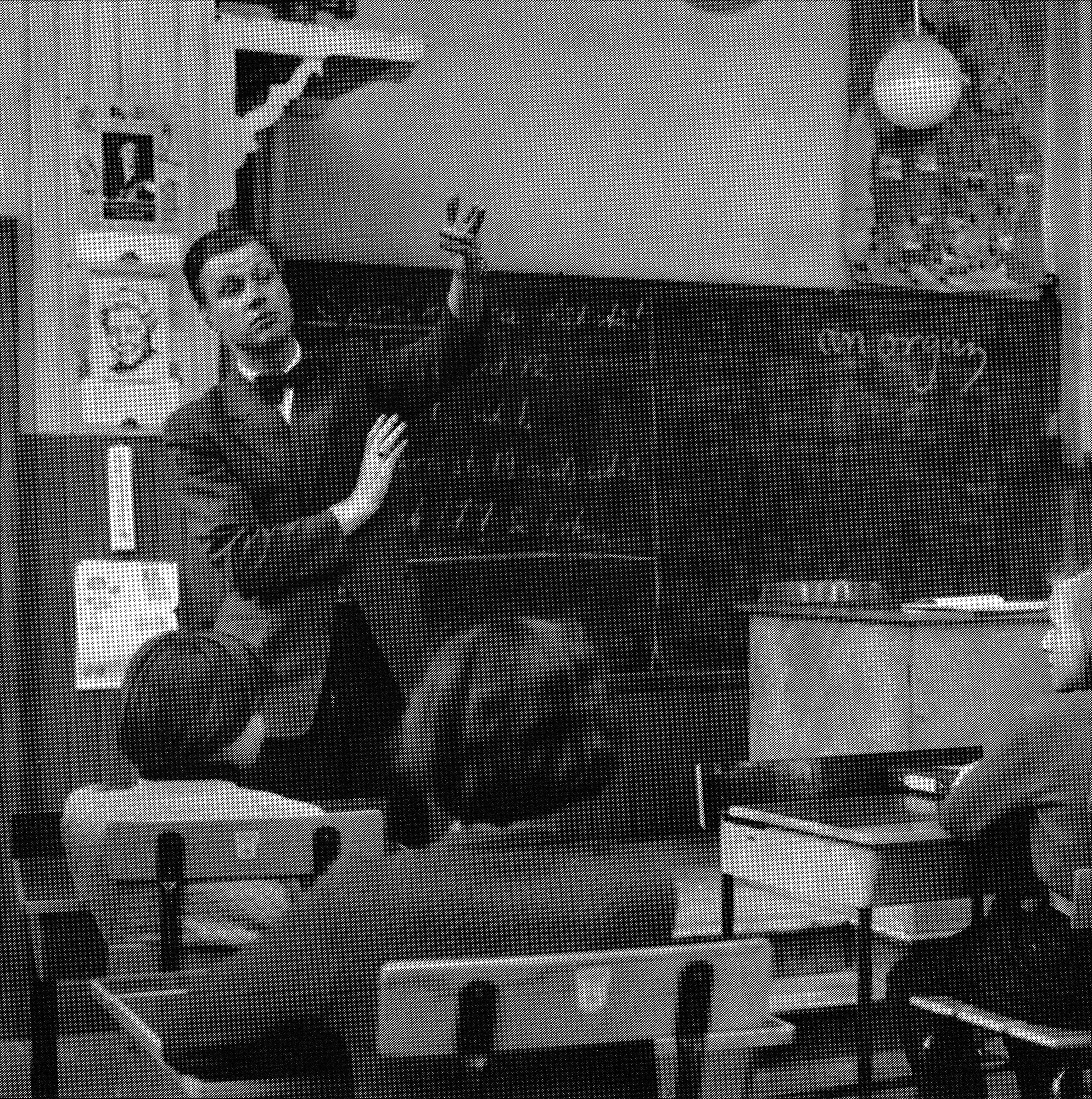 Rolf Lundgren från skolradion undervisar. Bilden har publicerats i Röster i Radio 1955:21 och i Skolradion 60 år (1988) sid.13.